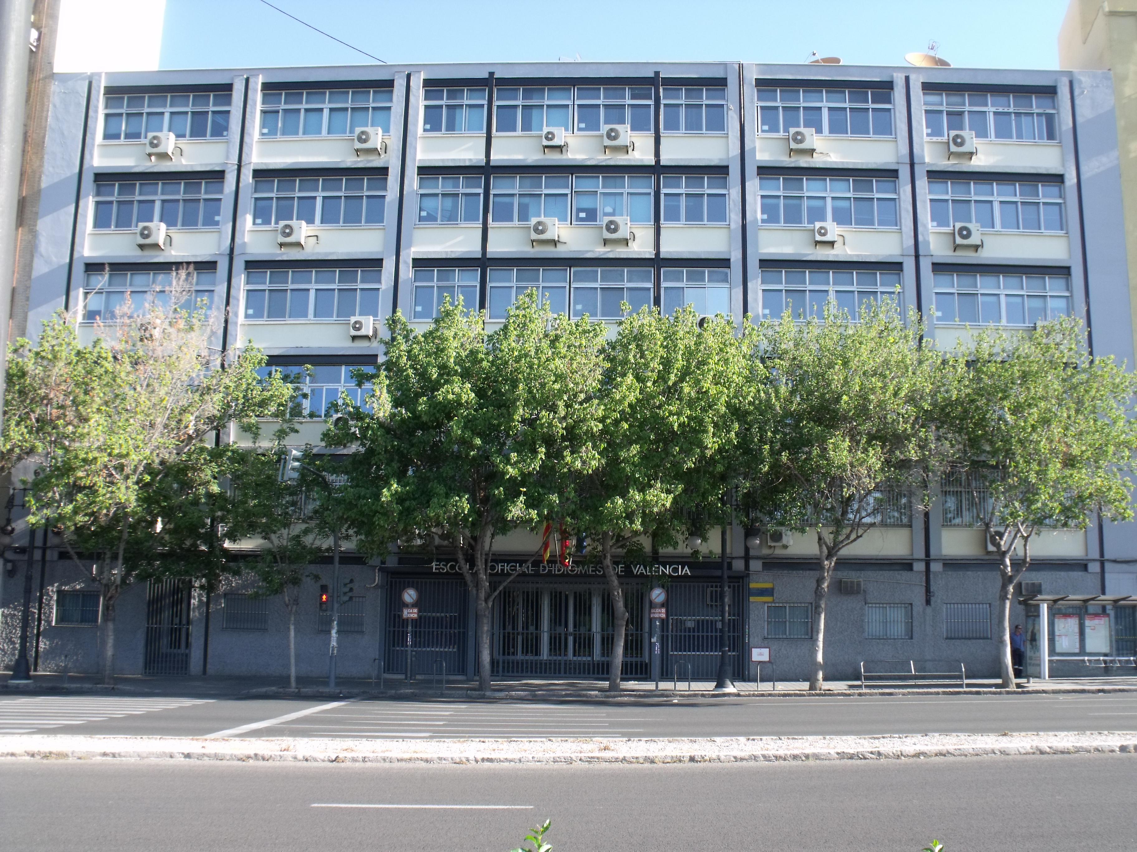 Escuela Oficial de Idiomas de Valencia.